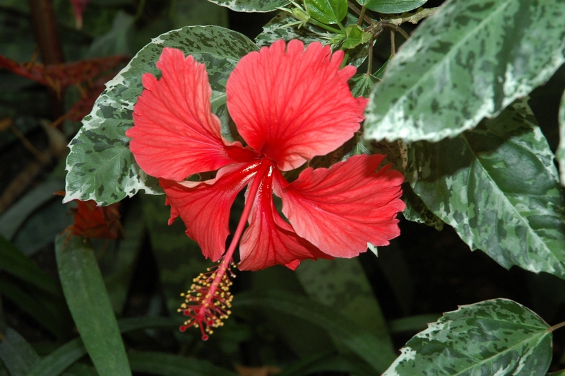 Hibiscus 'Cooperi'